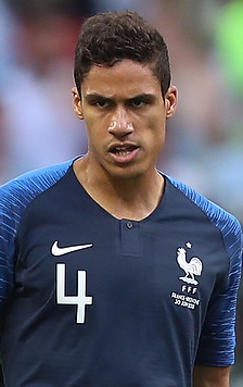 Сборная Франции оставила Месси и Аргентину за бортом чемпионата мира 2018